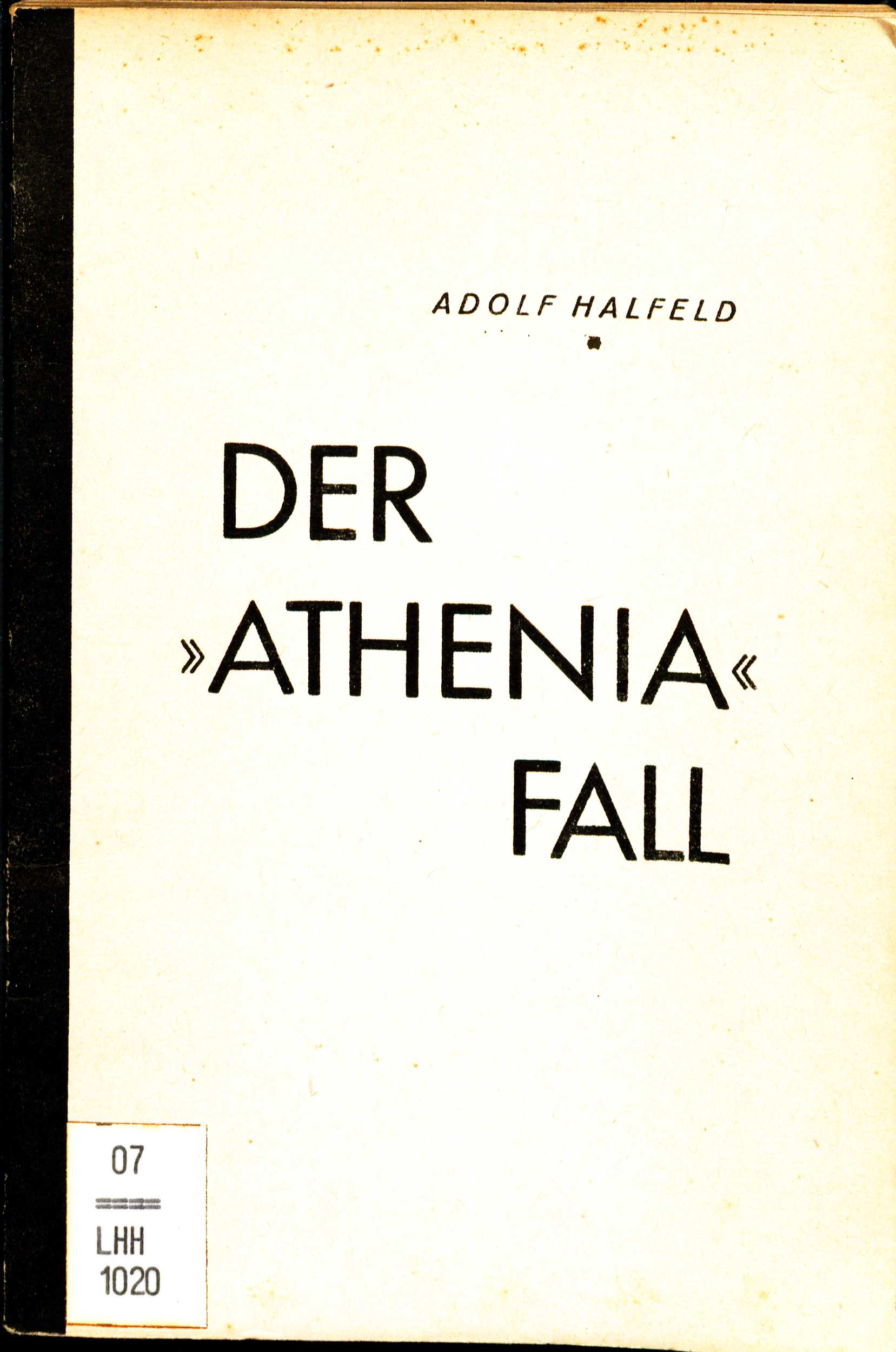 Adolf Halfeld Der "Athenia"-Fall Englands wahres Gesicht. Berlin : Volk und Reich, 1939. hier Auflage 1940. Einband. Umschlagsentwurf Horst Michel